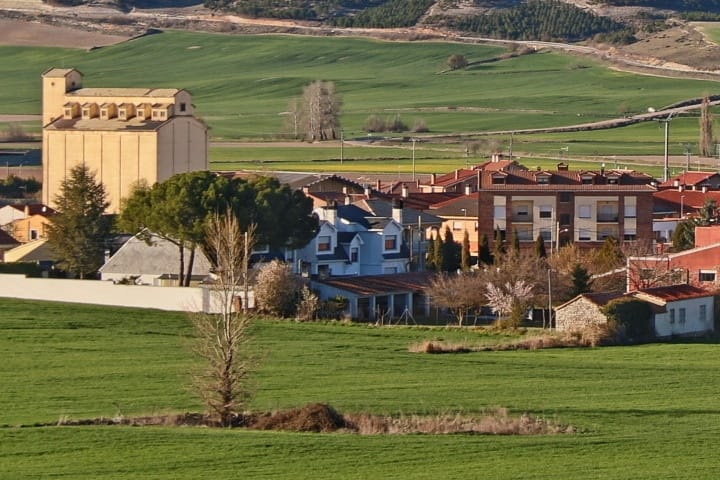 Nuevas edificaciones